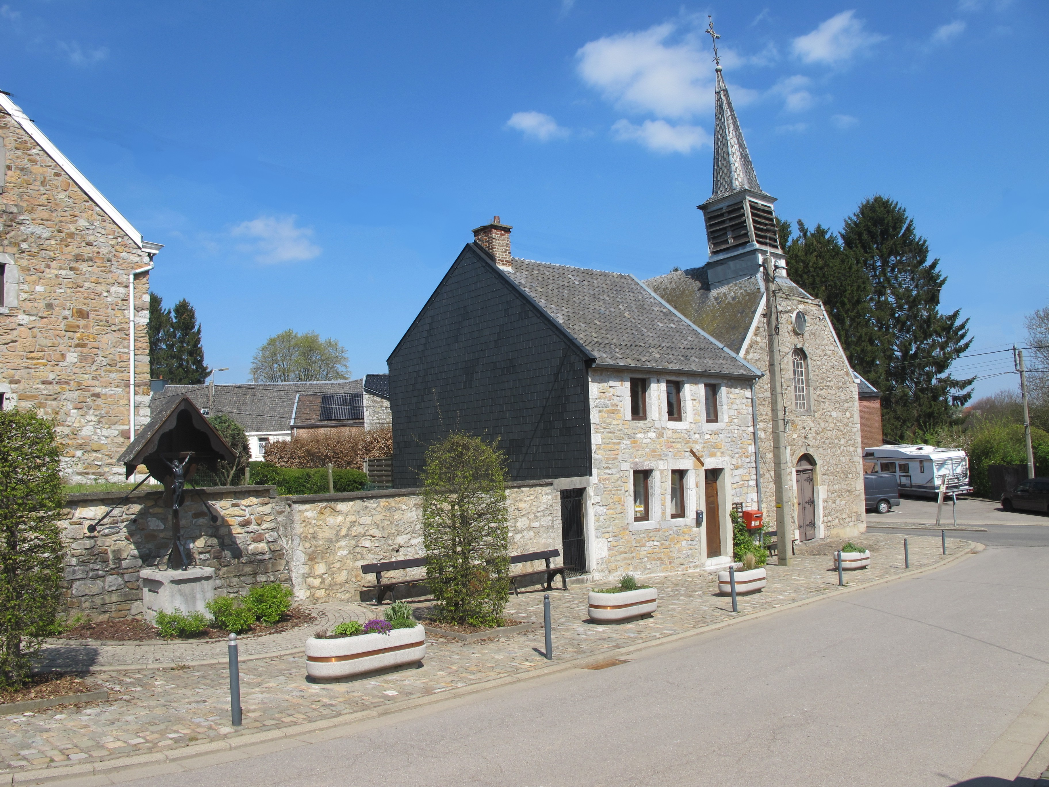 Hèvremont, place, église, et croix sur socle de la colonne "Hauptmann" de 1566